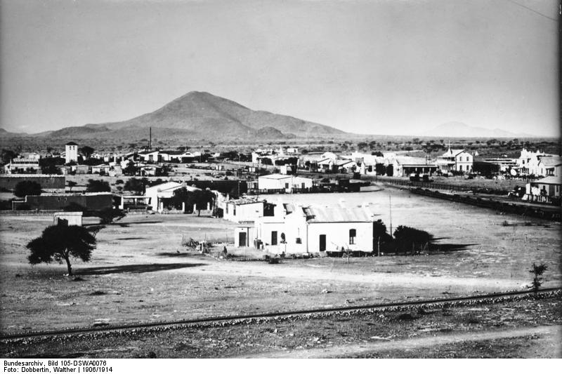 Karibib